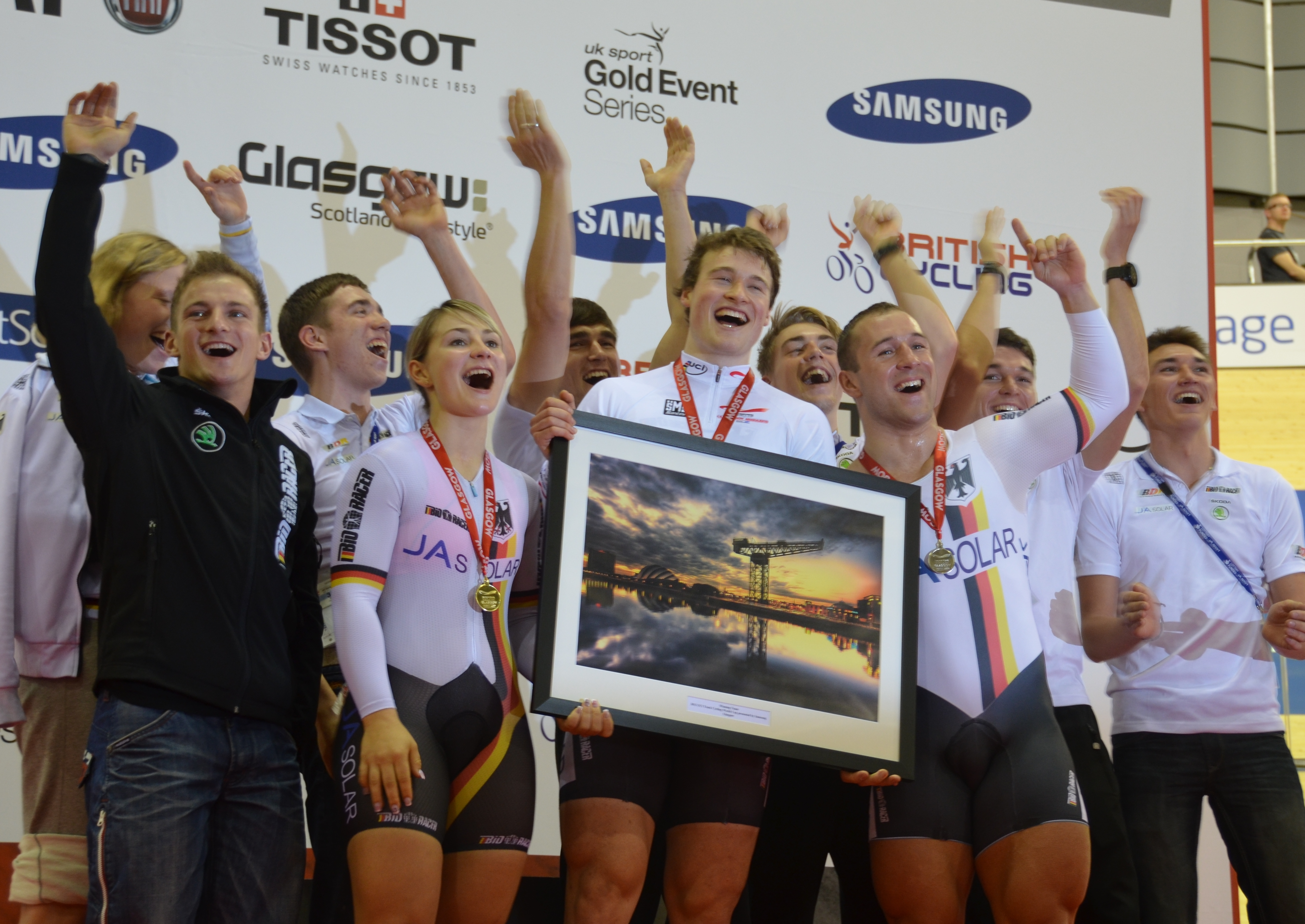 Bahnrad-Weltcup 2012 in Glasgow: die deutsche Mannschaft feiert ihren Gesamtsieg des Laufes